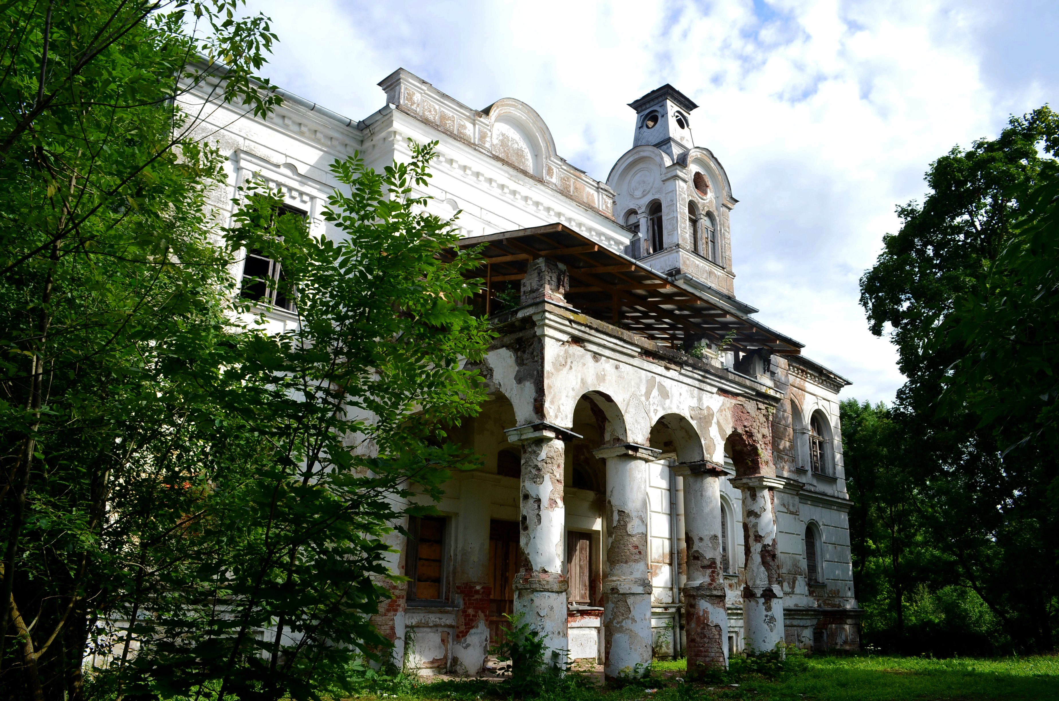 Sirutiškio dvaro rūmai, Kėdainių raj.